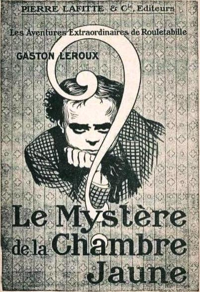 Détail d'une publicité pour Le Mystère de la Chambre Jaune.